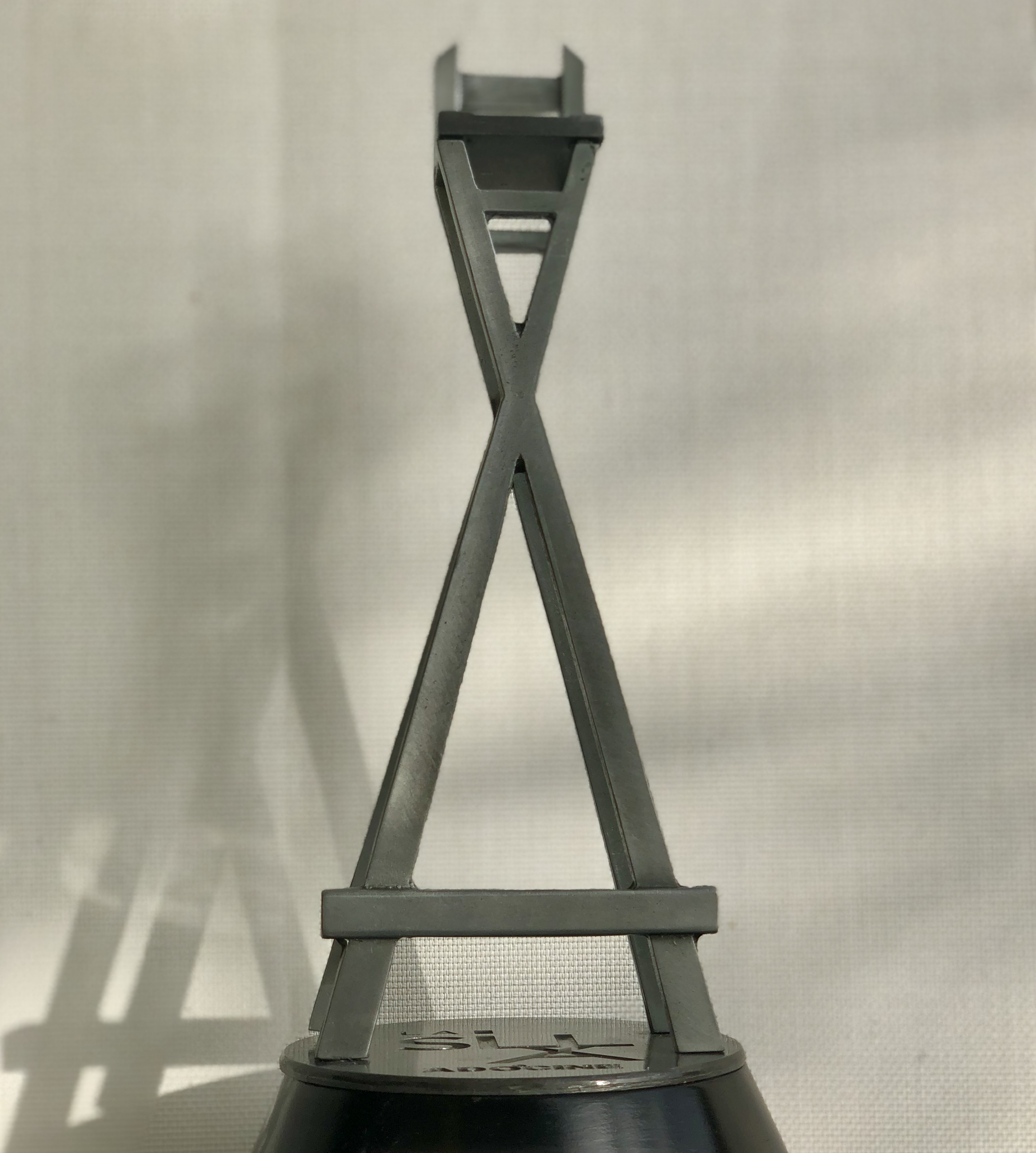 foto 2018 tomada por Luichy Guzmán